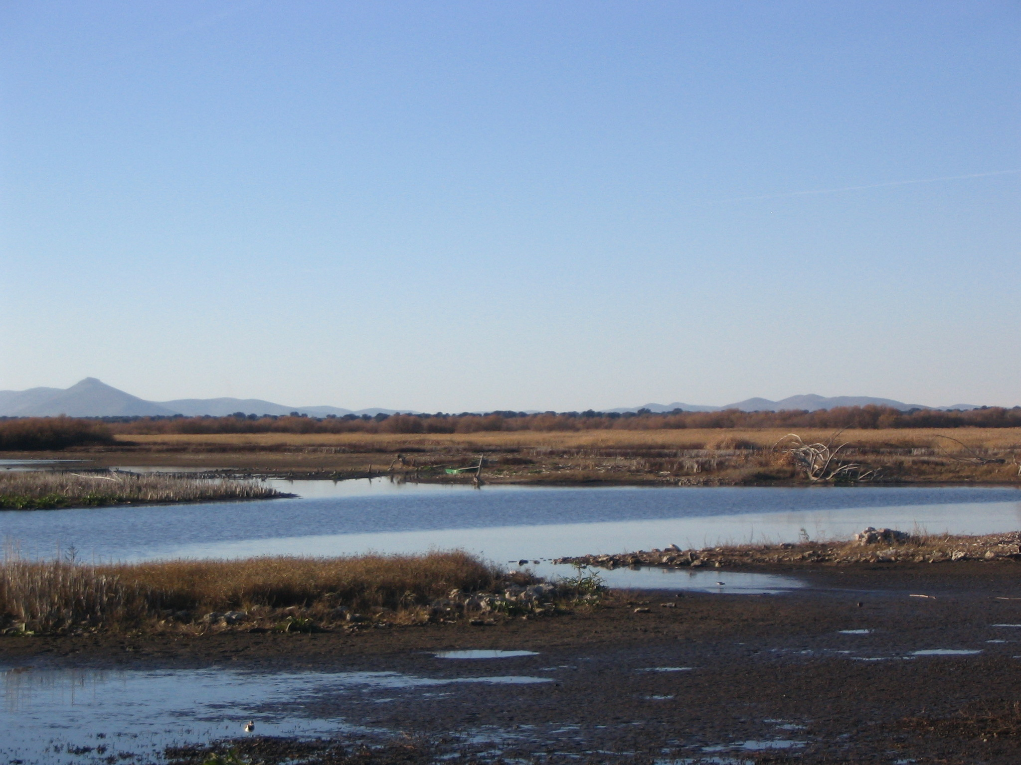 Tablas de Daimiel (España)